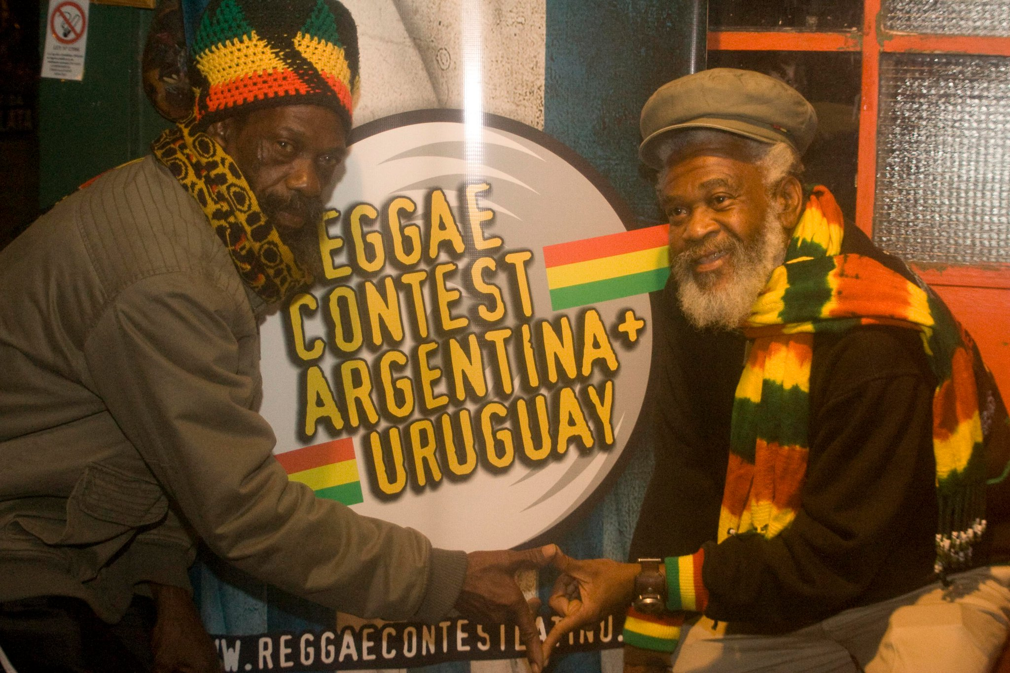 The Abyssinians en el Lanzamiento del Rototom Reggae Contest Latino 2010-2011